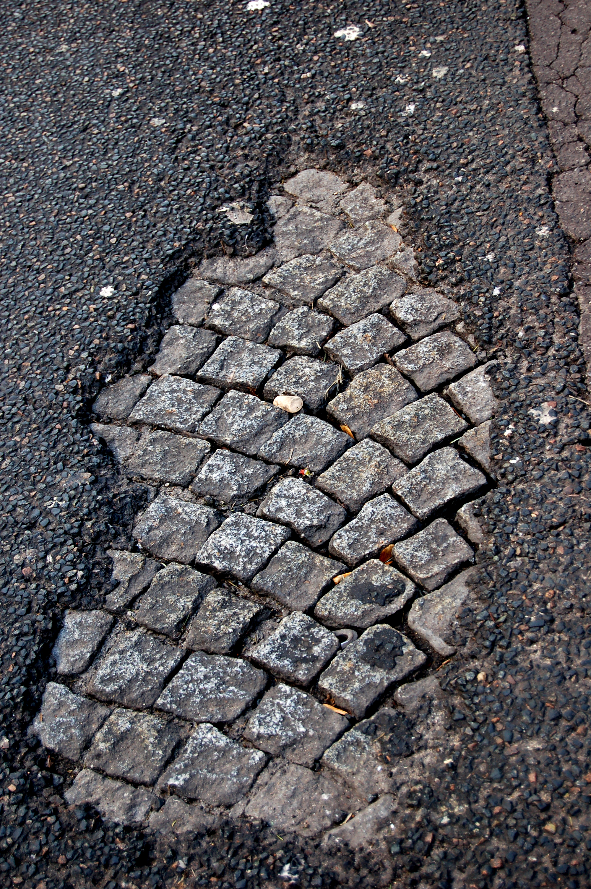 Pavés effleurant sous le bitume